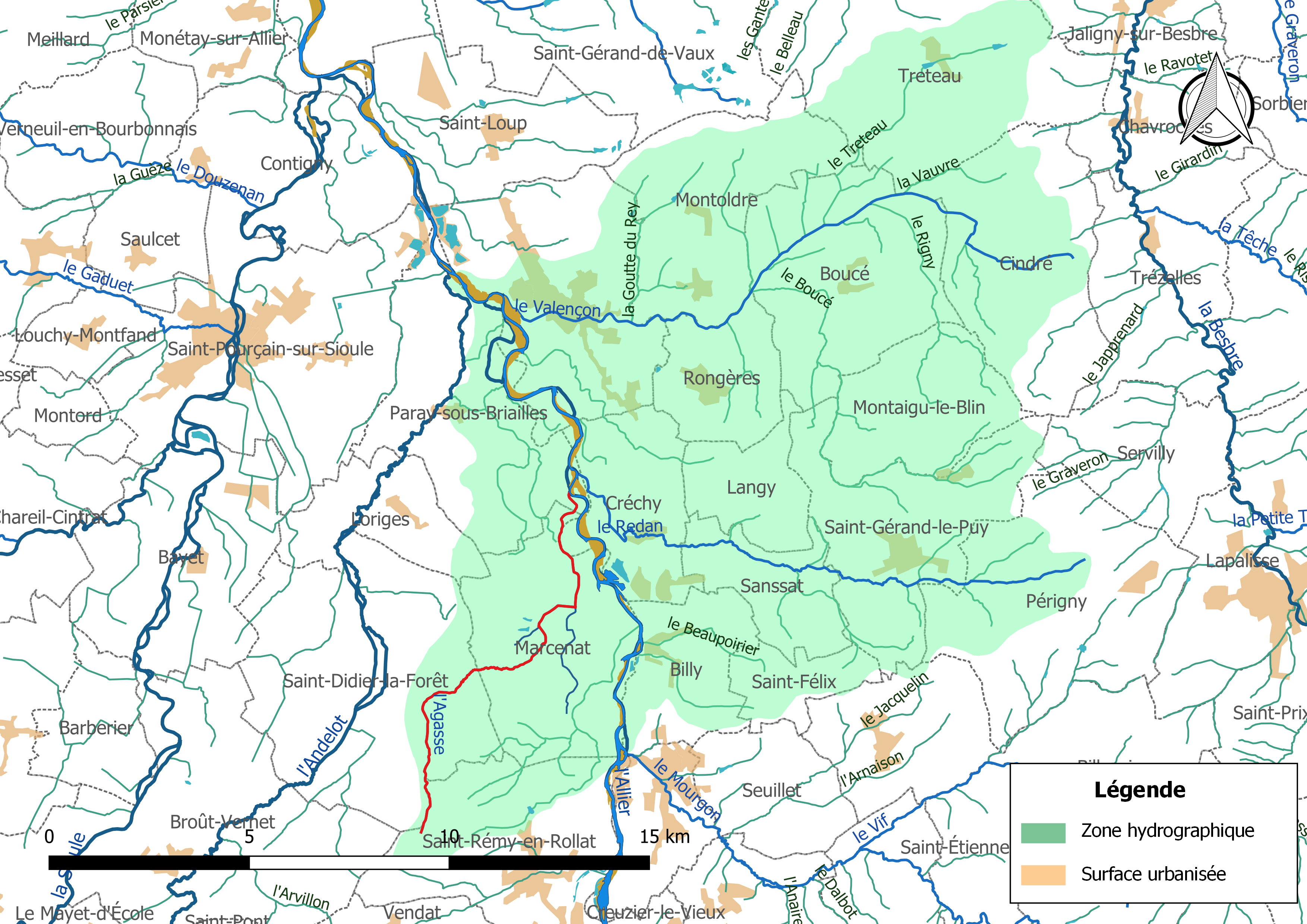 Carte du cours d'eau « l'Agasse » (France) et de la zone hydrographique dans laquelle il s'insère.